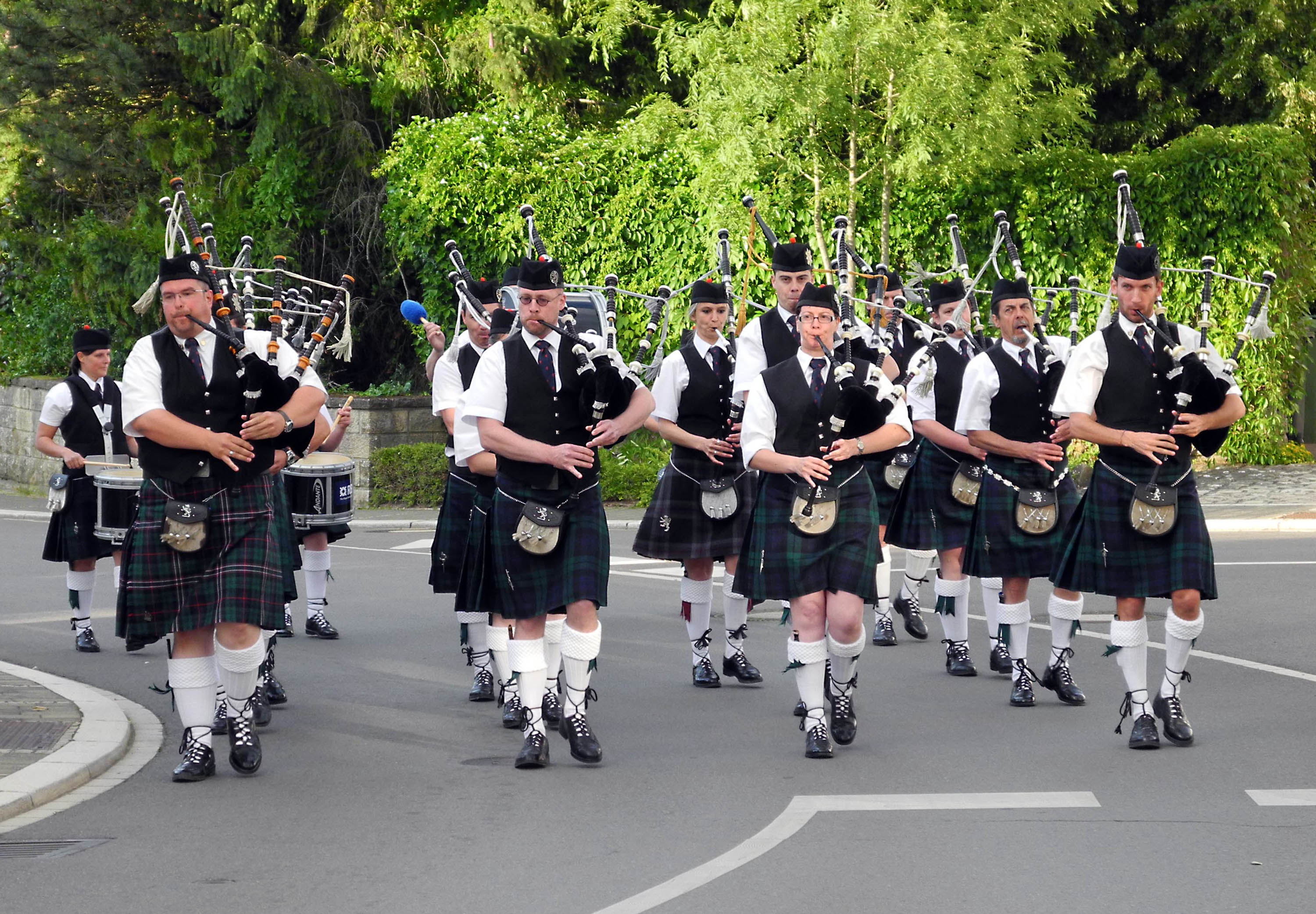 The Luxembourg Pipe Band spillt zu Mamer